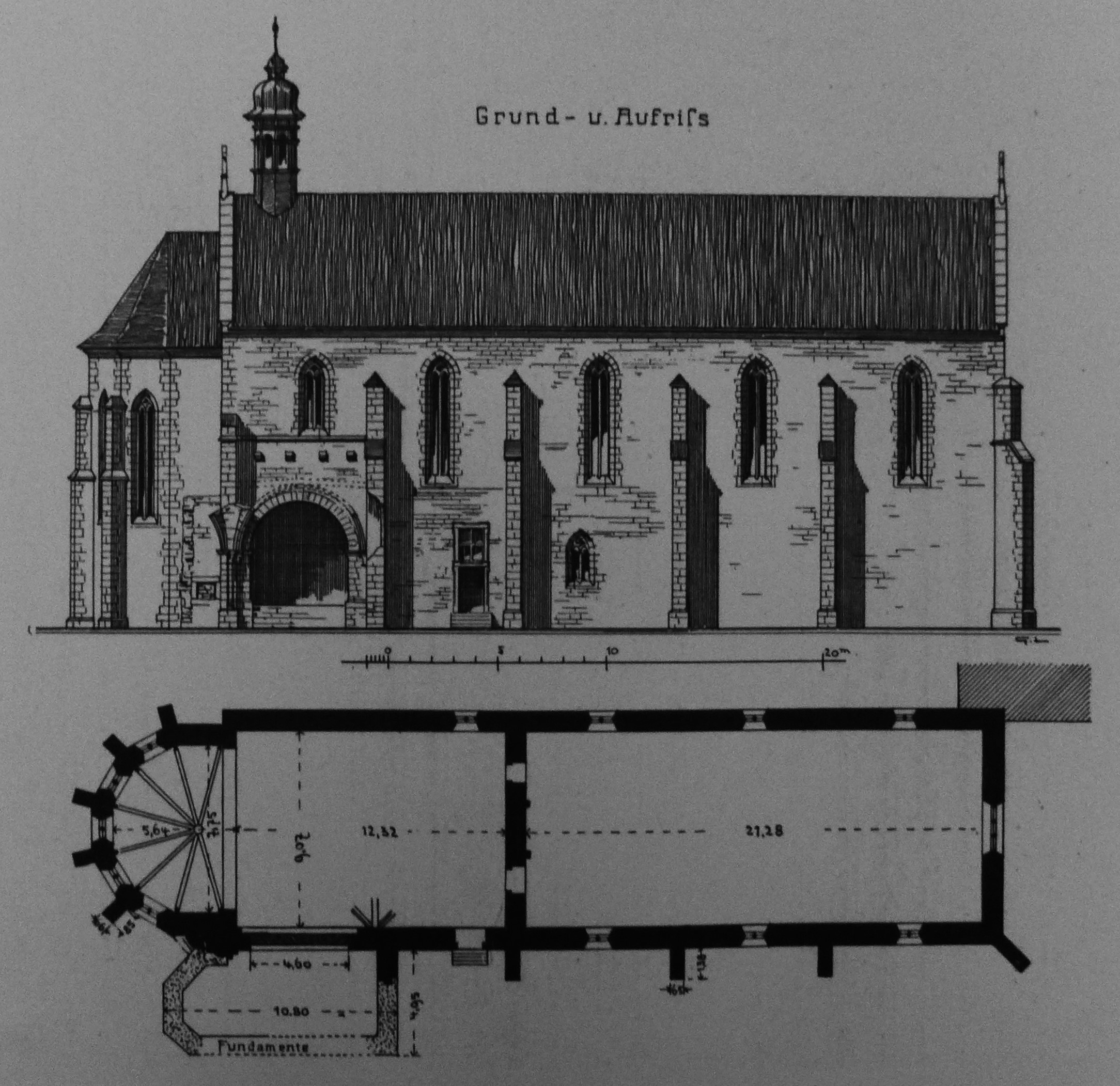 Grund und Aufriss der ehemaligen Klosterkirche St. Markus in Heiligenthal bei Schwanfeld (Landkreis Schweinfurt), aus: Felix Mader und Georg Lill: Die Kunstdenkmäler des Königreichs Bayern, Stadt und Bezirksamt Schweinfurt, Reihe III, Band 17, München 1917.